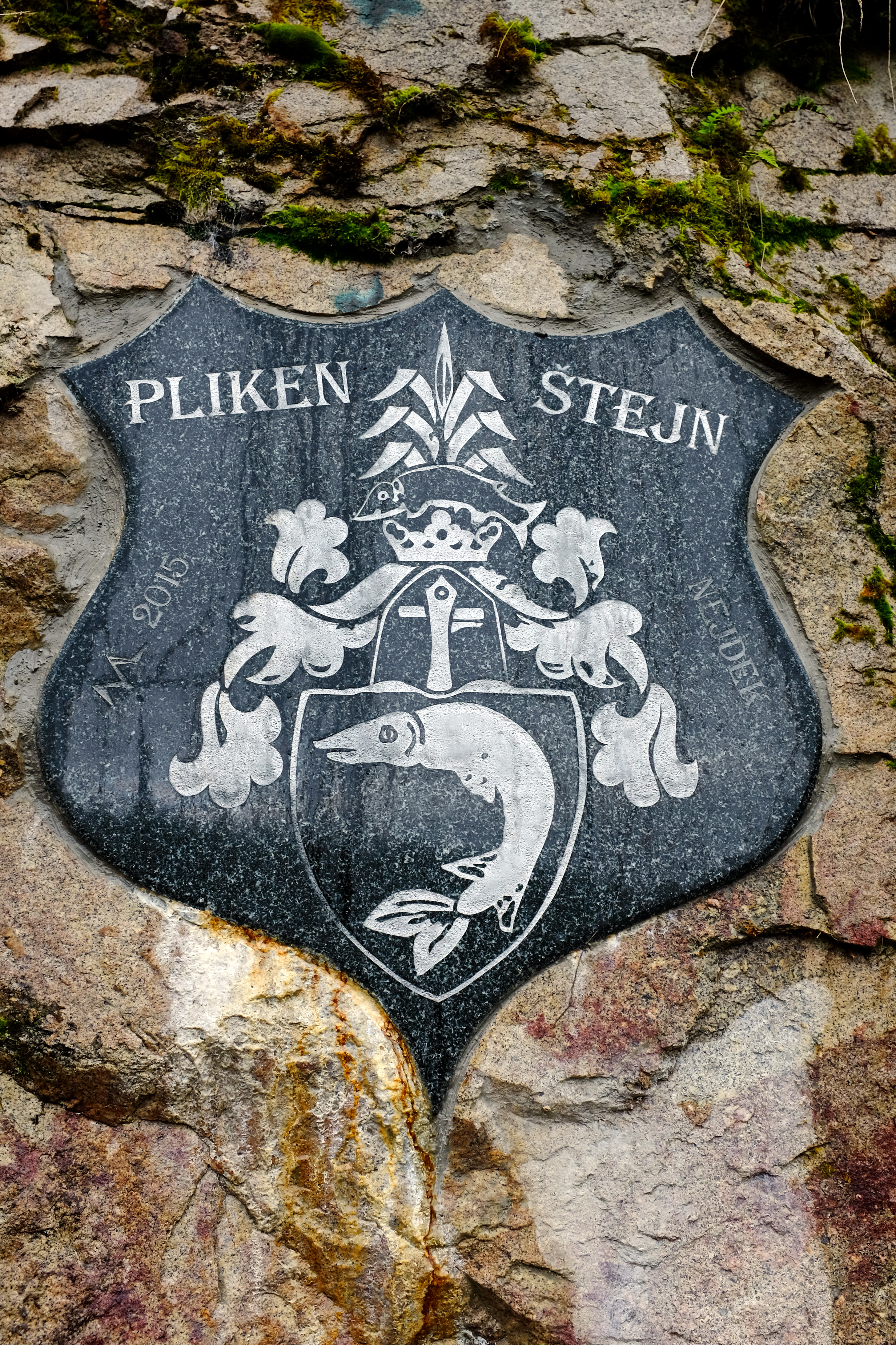 Pozůstatek hradu (hradiště) Plikenštejn, erb Pliků, Slavkovský les, okres Sokolov